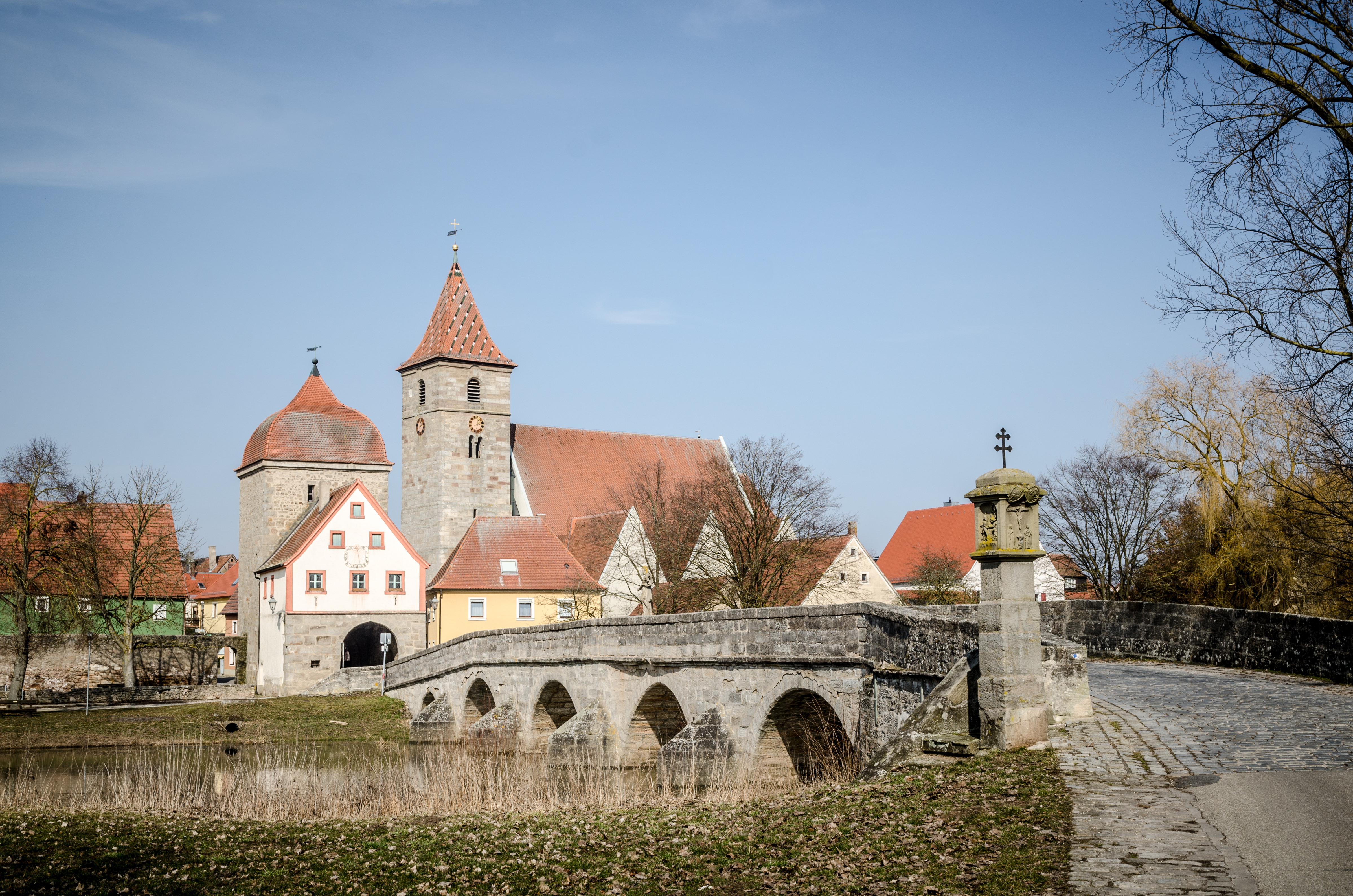 Die Altstadt von Ornbau mit Altmühlbrücke und dem Unteren TorThis is a photograph of an architectural monument.